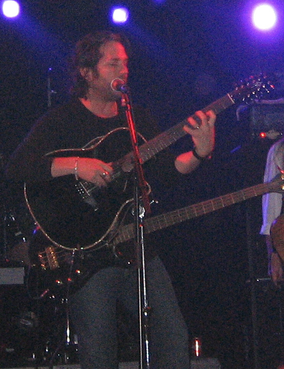 Kip Winger Nosturissa 15.10.2006